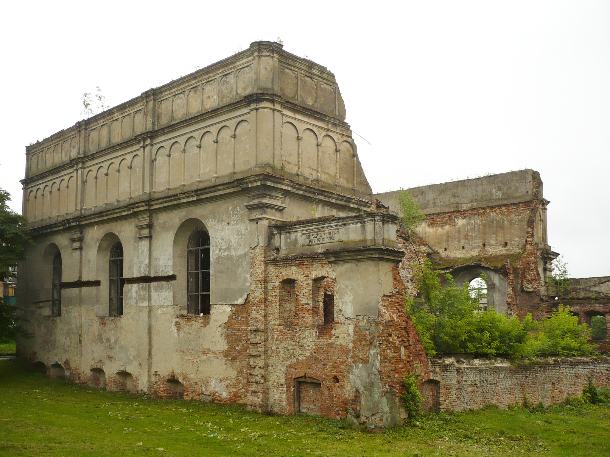 Synagoga w Brodach na Ukrainie